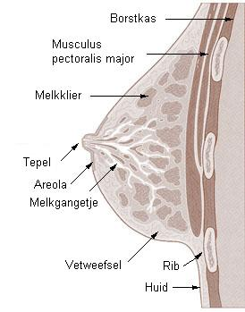 Anatomie van de vrouwelijke borst